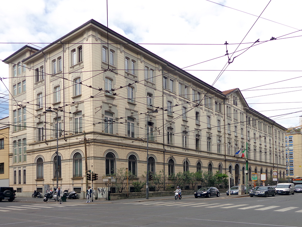 Milano, la sede dell'Istituto Gonzaga in via Vitruvio 41 (angolo via Mauro Macchi e via Luigi Settembrini); l'edificio fu costruito nel 1905 su progetto di Francesco Morteo.Fonte: Maurizio Boriani, Corinna Morandi, Augusto Rossari, Milano contemporanea. Itinerari di architettura e di urbanistica, Maggioli Editore, 2007, p. 165. ISBN 978-88387-4147-6 Invalid ISBN.